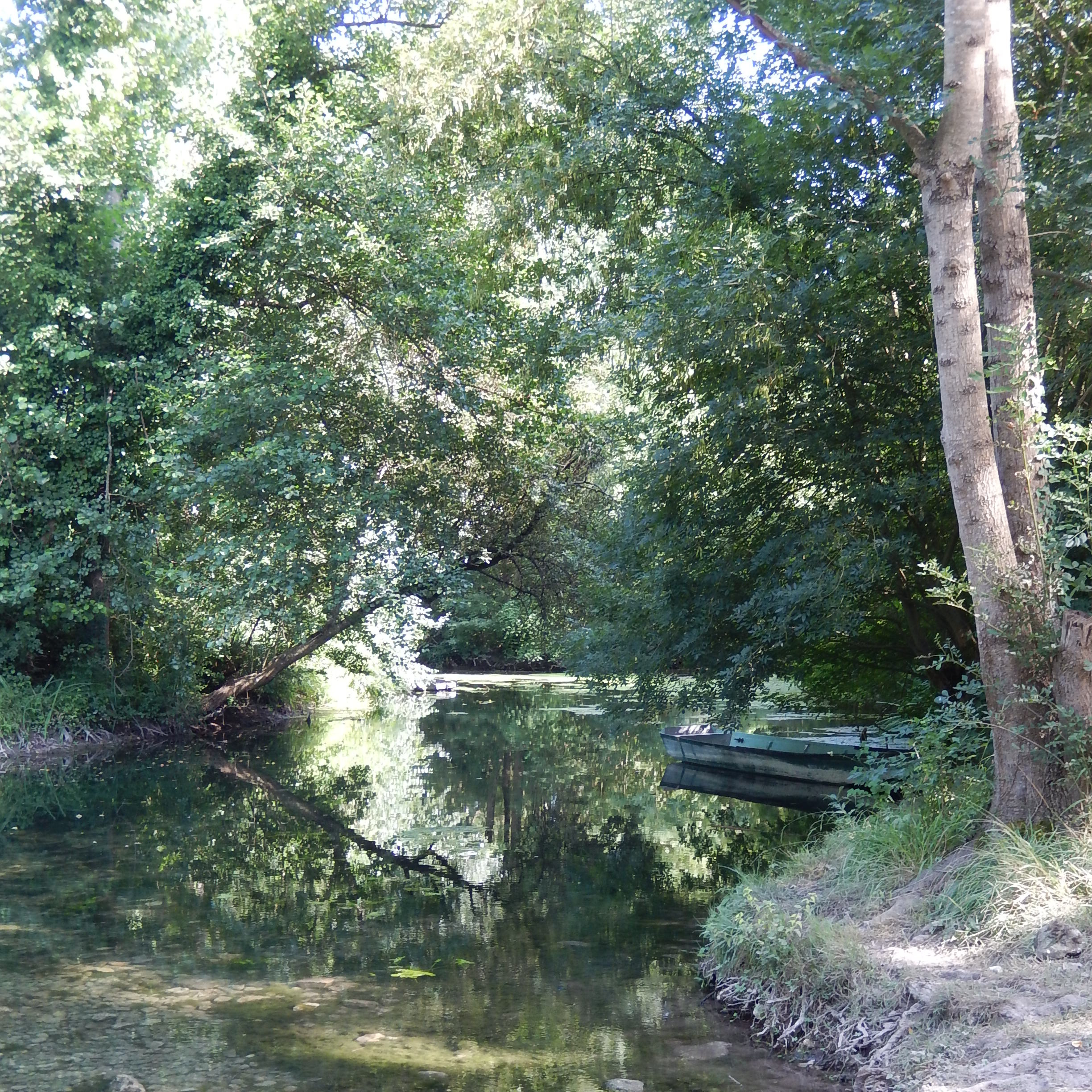 Commune de Colombiers, Charente-Maritime, France — La Longe de Colombiers, un des bras de la rivière Seugne qui coule à Colombiers.